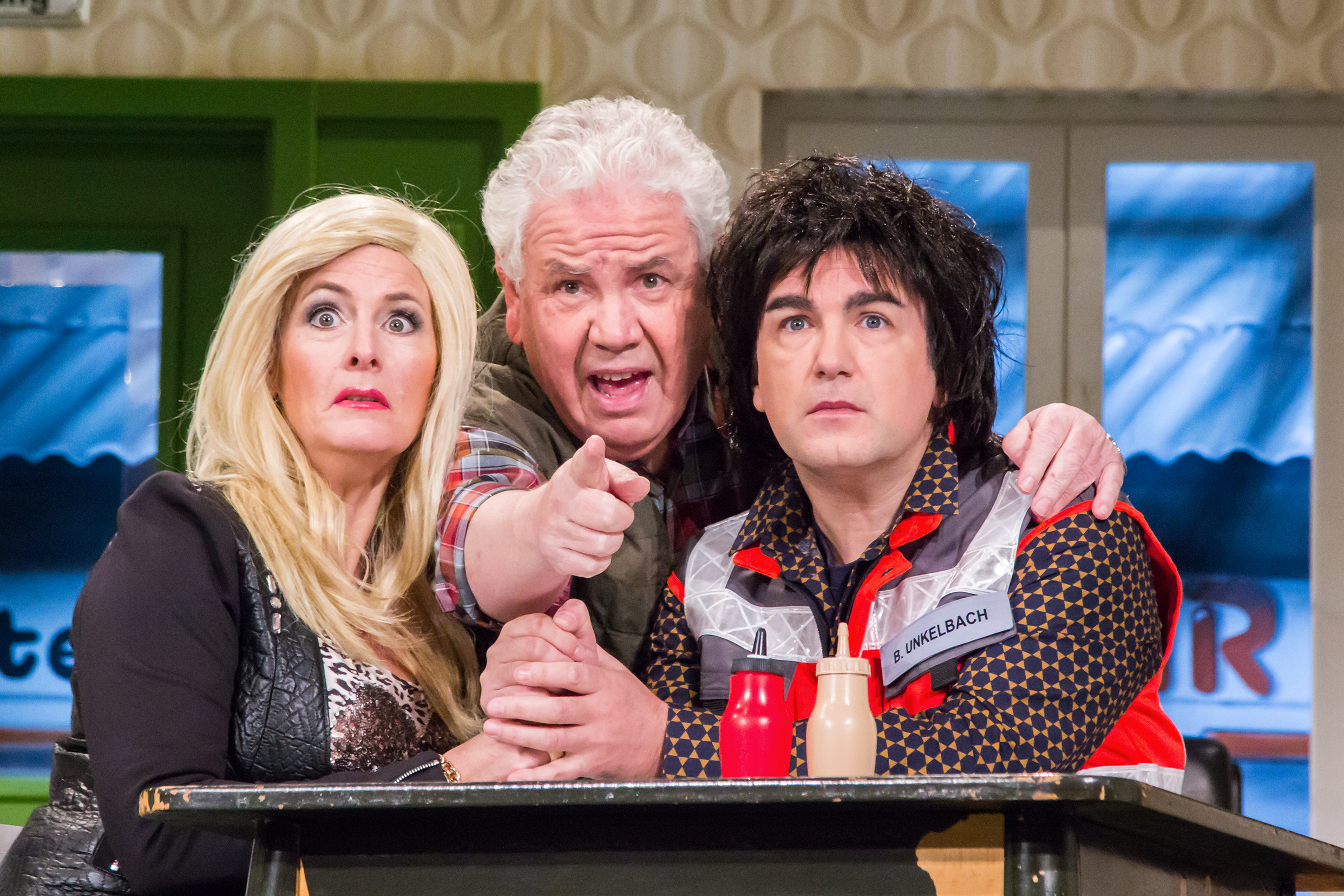 Szene aus dem Stück "Käsch in de Täsch" aus dem Millowitsch-Theater in Köln, 2015. Ariana Weil, Peter Millowitsch, Robert Sertic